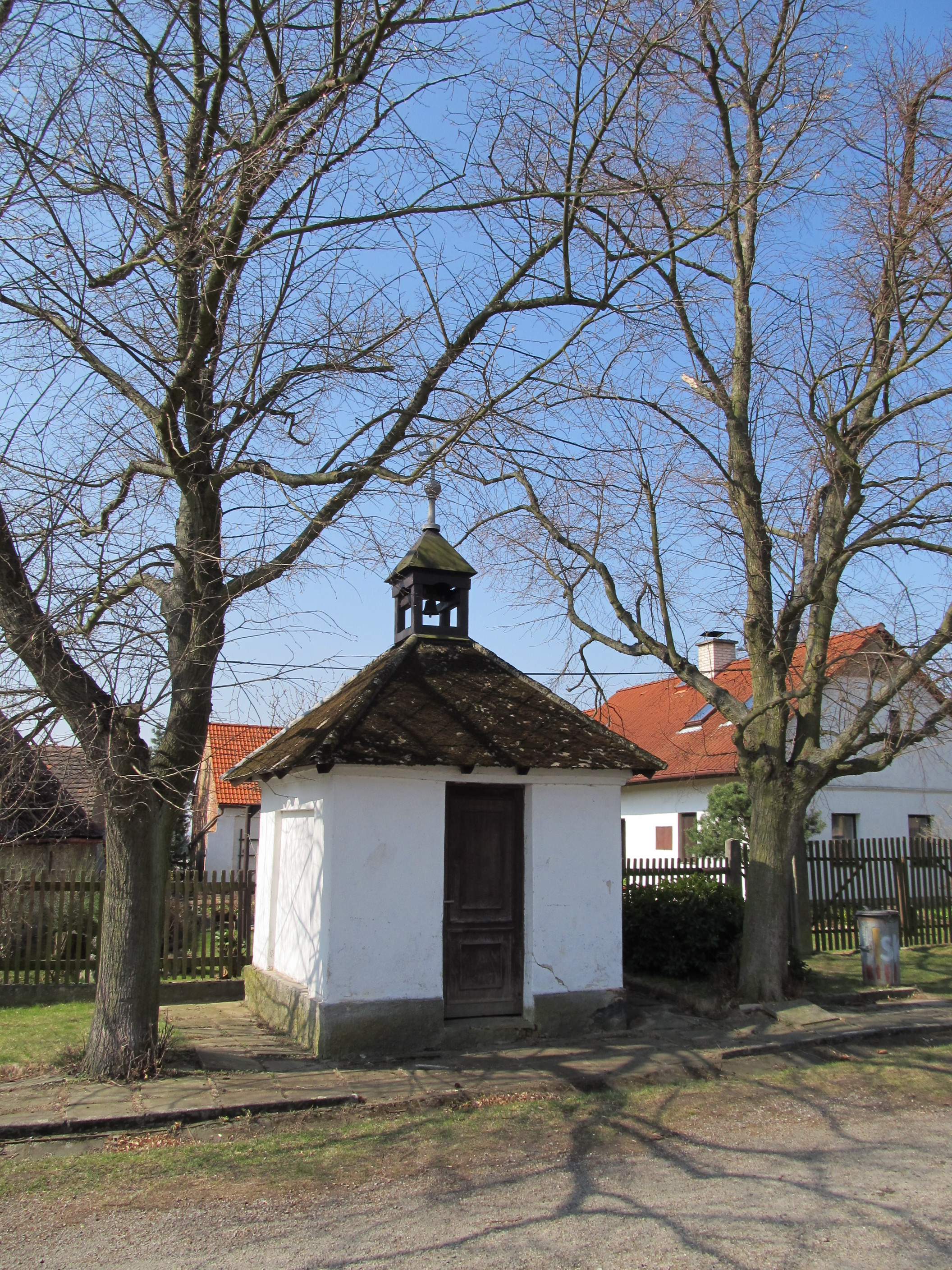 Skoupý - kaplička